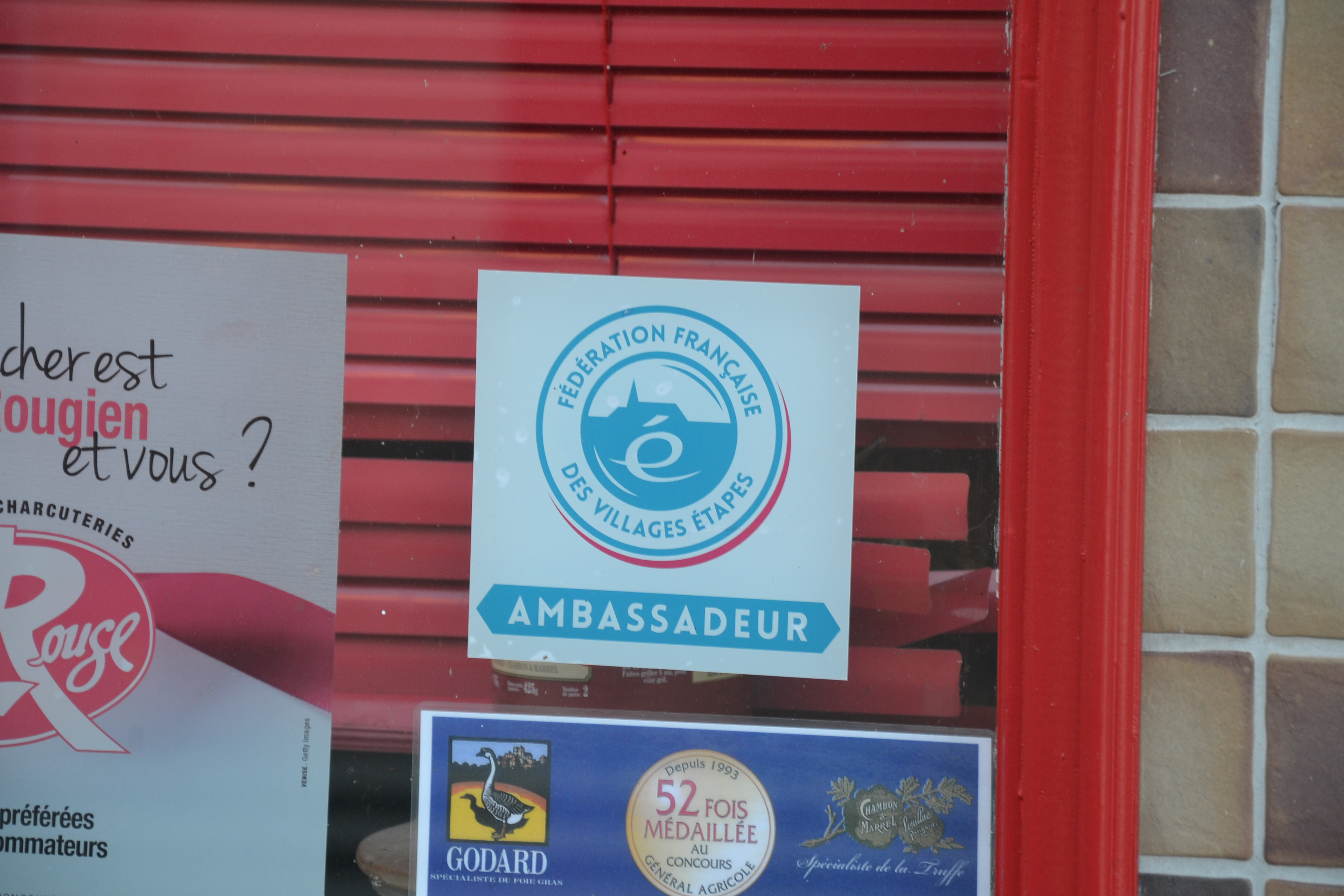 Sticker signalant une participation au programme Village-étape à Pierre-Buffière (Haute-Vienne, France).